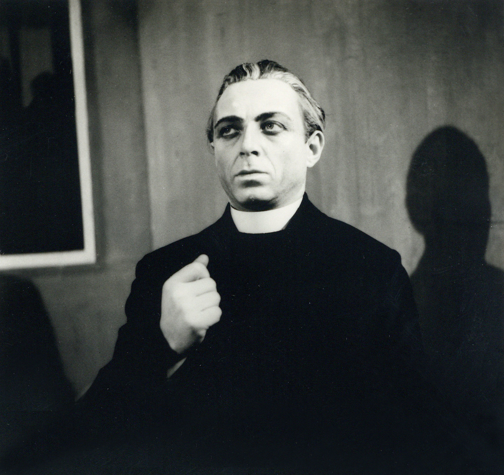 Ivan Cankar, Hlapci, SNG za Svobodno tržaško ozemlje. Na fotografiji: Jože Babič kot Župnik.